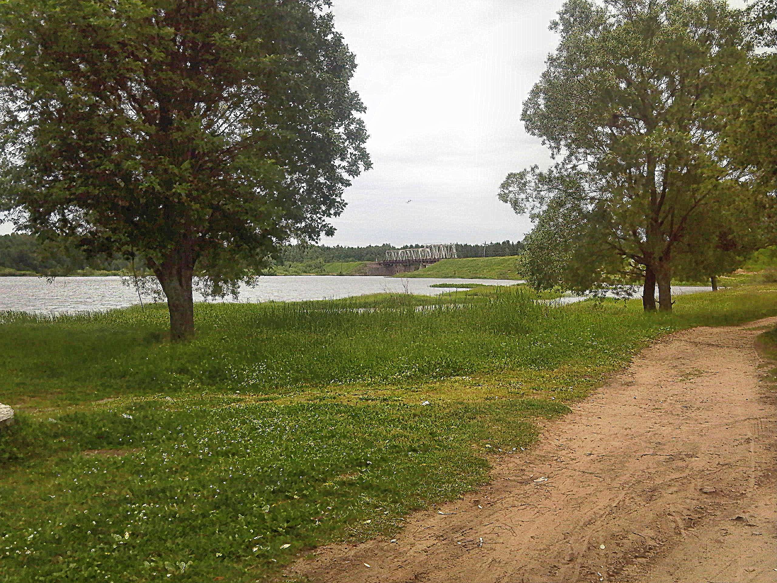 Вид на Волгу и железнодорожный мост в посёлке Пено